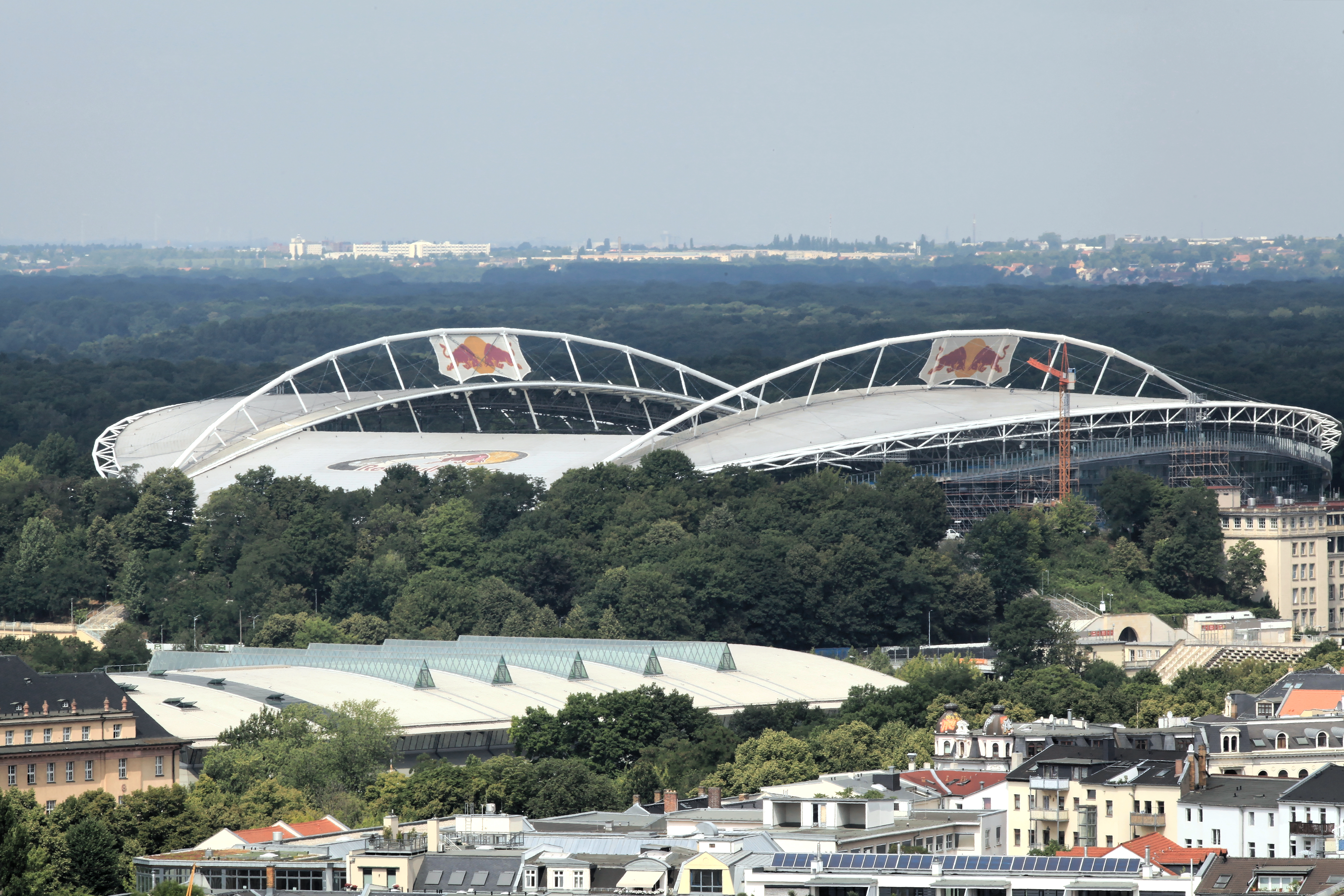 Blick vom Turm des Neuen Rathauses in Leipzig